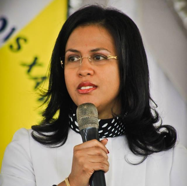 madavision